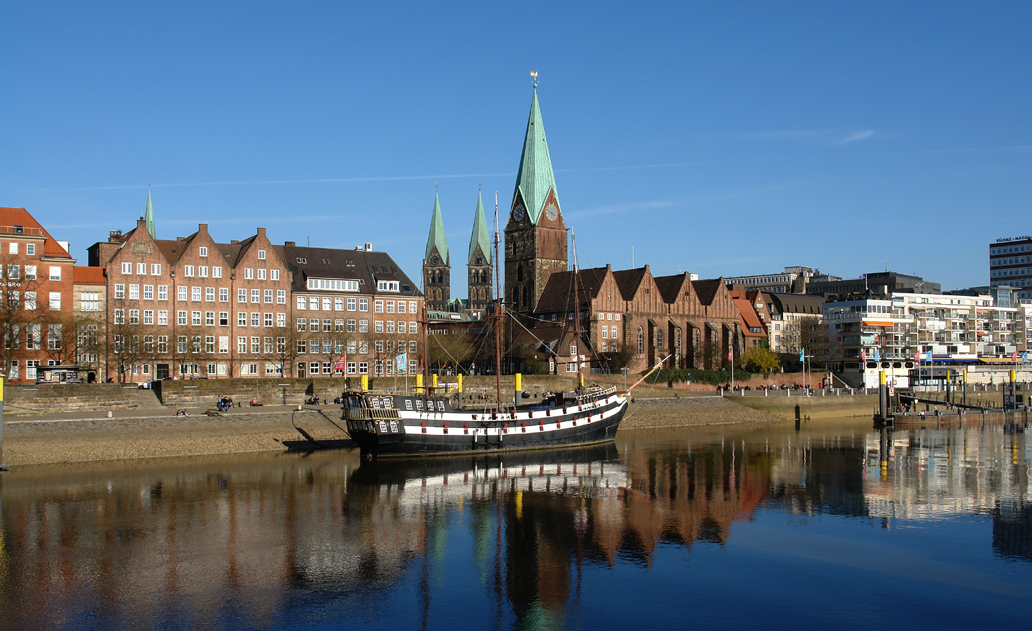 Schlachte in Bremen. Blick von der Teerhofbrücke, Pannekoekschip „Admiral Nelson“, Domtürme, Sankt Martini